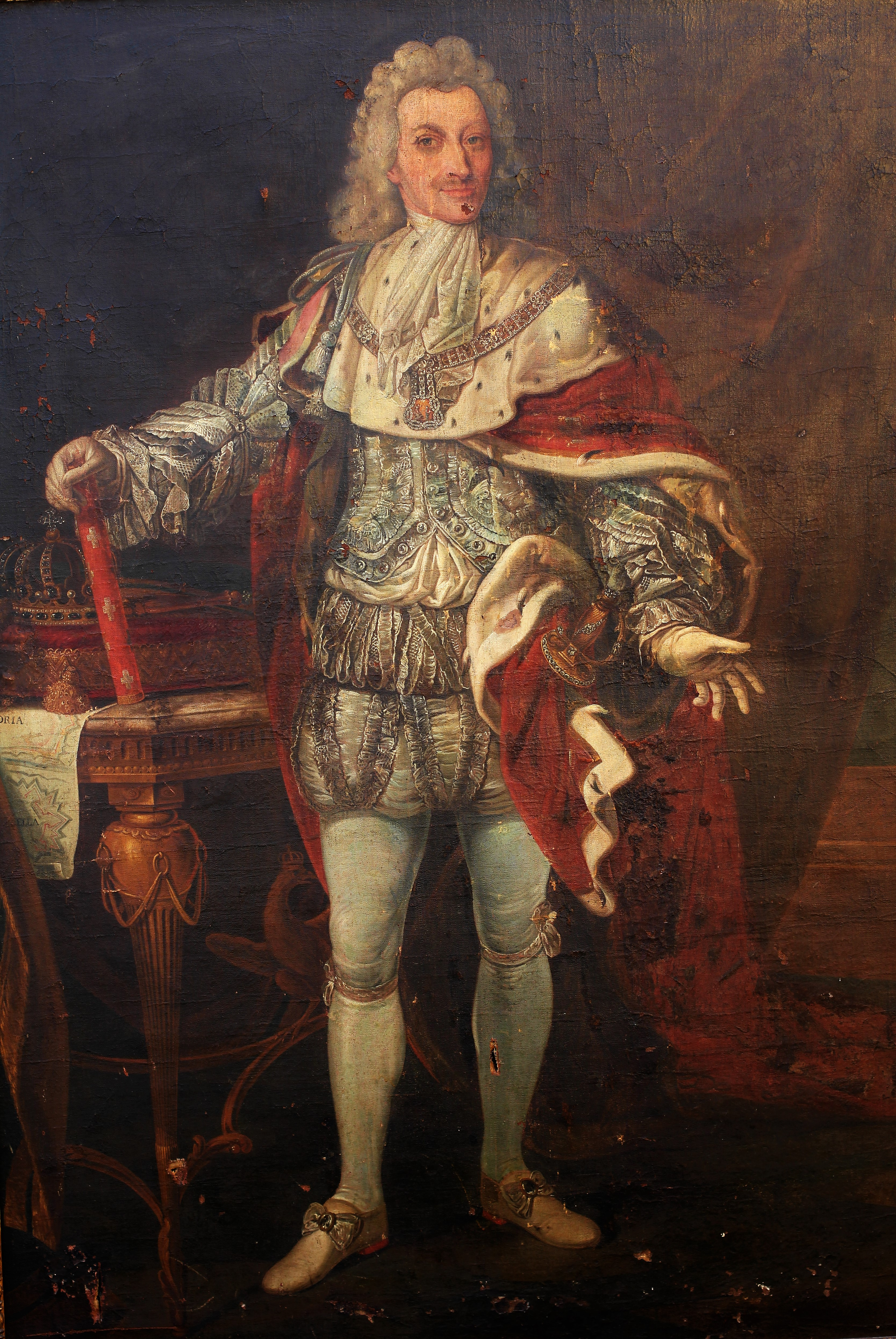 Re Vittorio Amedeo II di Savoia che nel 1728 a seguito della sua ascesa al trono ordina all'ing.Conte di Exelles, Ignazio Bertola da Roveda la progettazione e l'erezione di una nuova Cittadella in Alessandria. Ciò si desume facilmente dal quadro in quanto è ritratta una mappa con il progetto di una cittadella da cui emerge in chiaro la parola NDRIA. (l'Ufficio Conservazione beni mobili dell Reggia Venaria a Torino che, esaminata la foto, conferma quanto sopra)